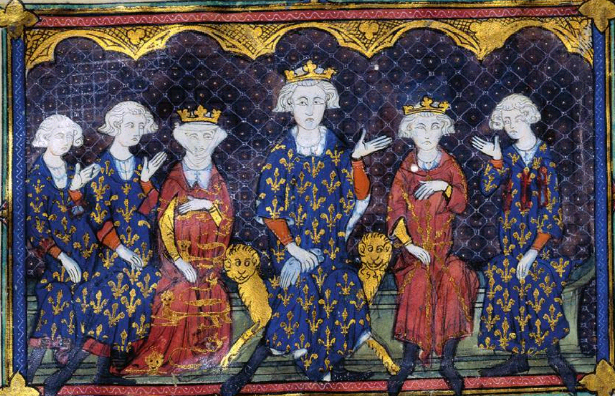 Миниатюра "Филипп IV с семьёй". Raymond de Béziers, ca. 1313, Paris, Bibliothèque nationale de France, MS lat. 8504